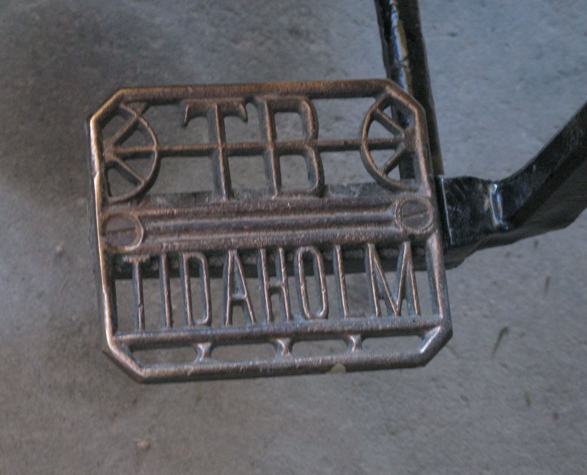 Tidaholm footstep